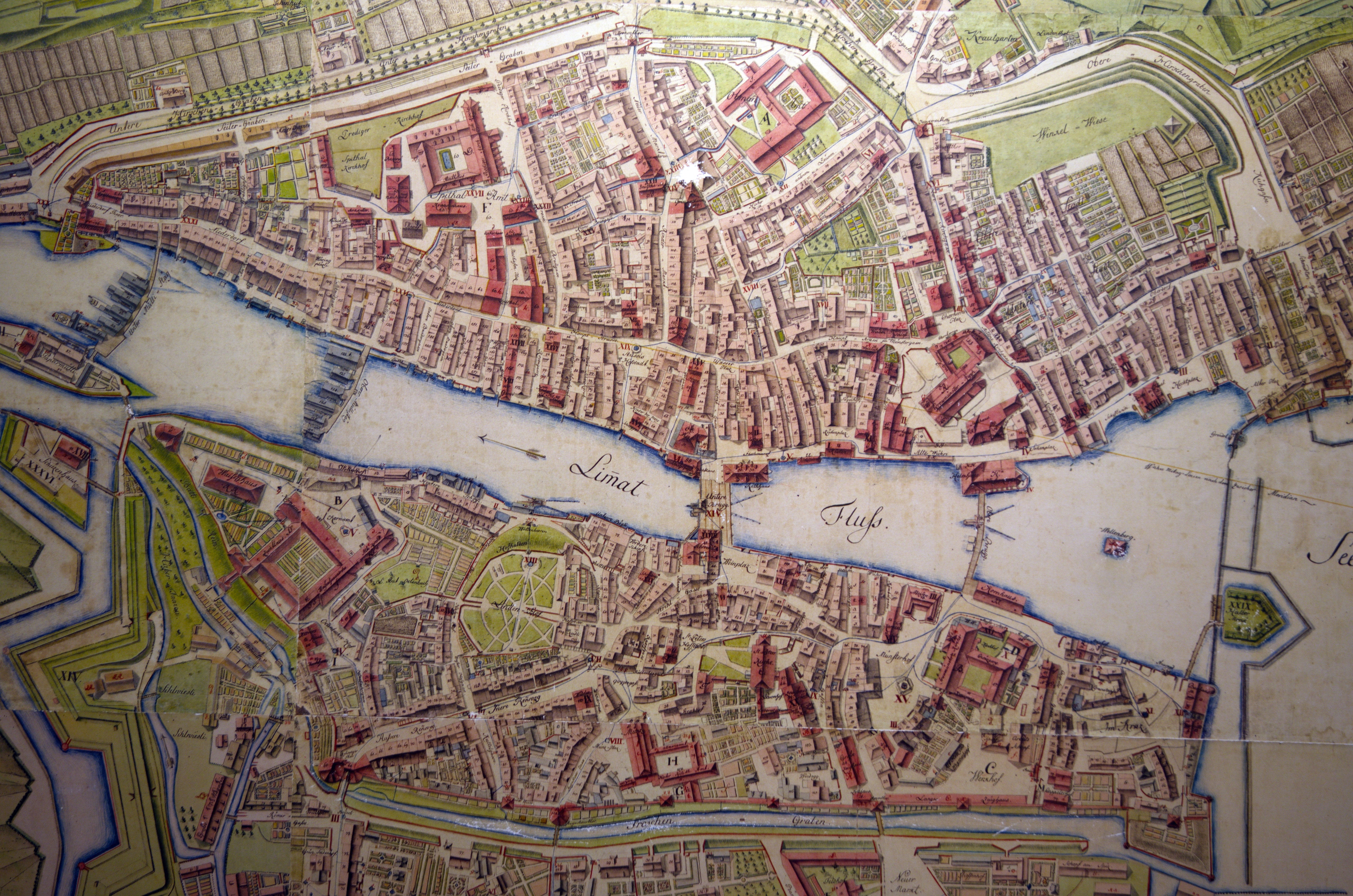 Altstadt von Zürich, Müllerplan 1793